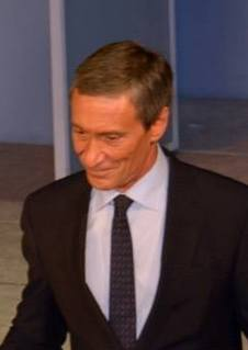 François Levantal, à la fin d'une représentation de la pièce « Le Placard ».